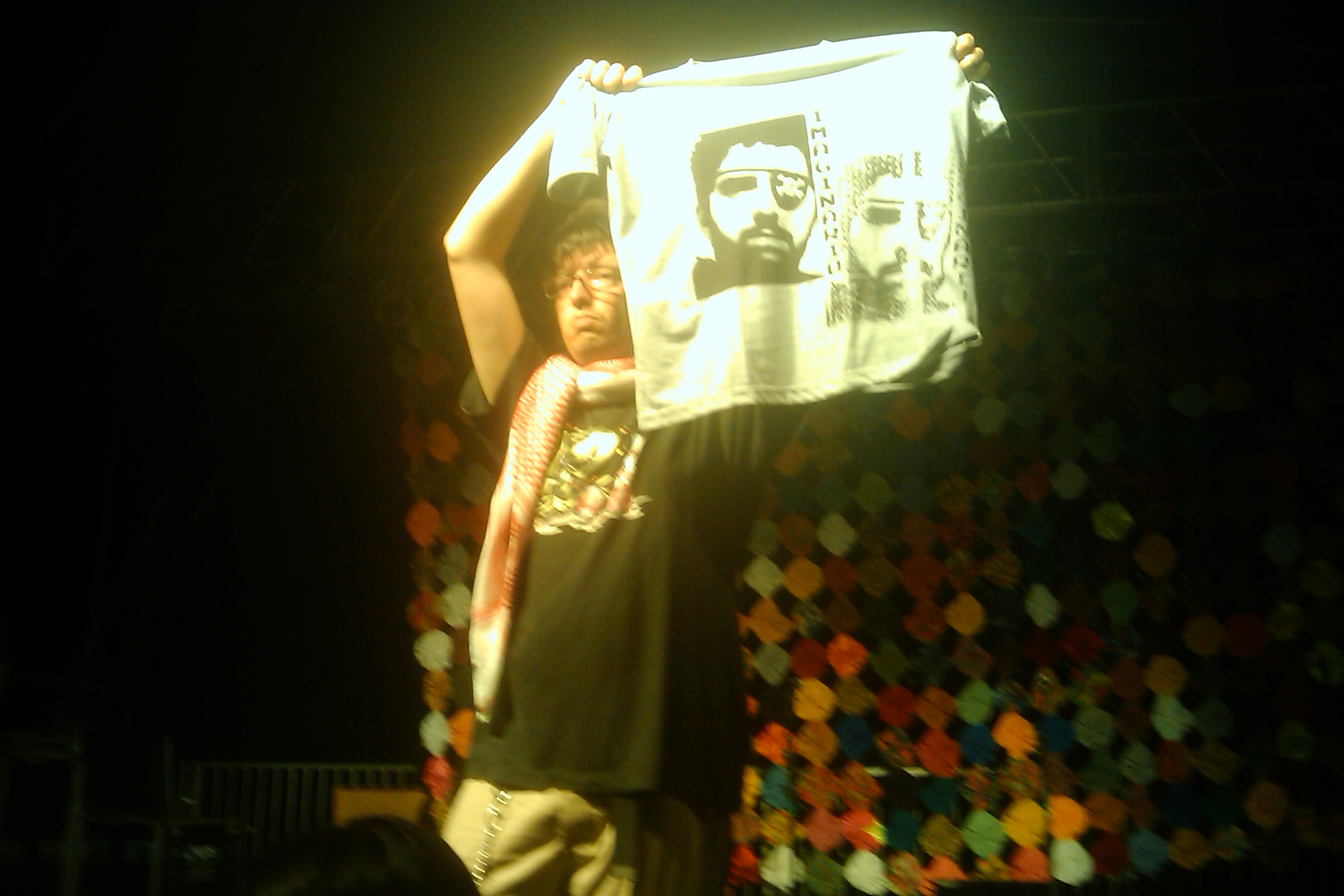 Daniel Duende, com o lenço que o Dpadua tanto adorava, liderando a fantástica homenagem no final da apresentação do Seu Estrelo.